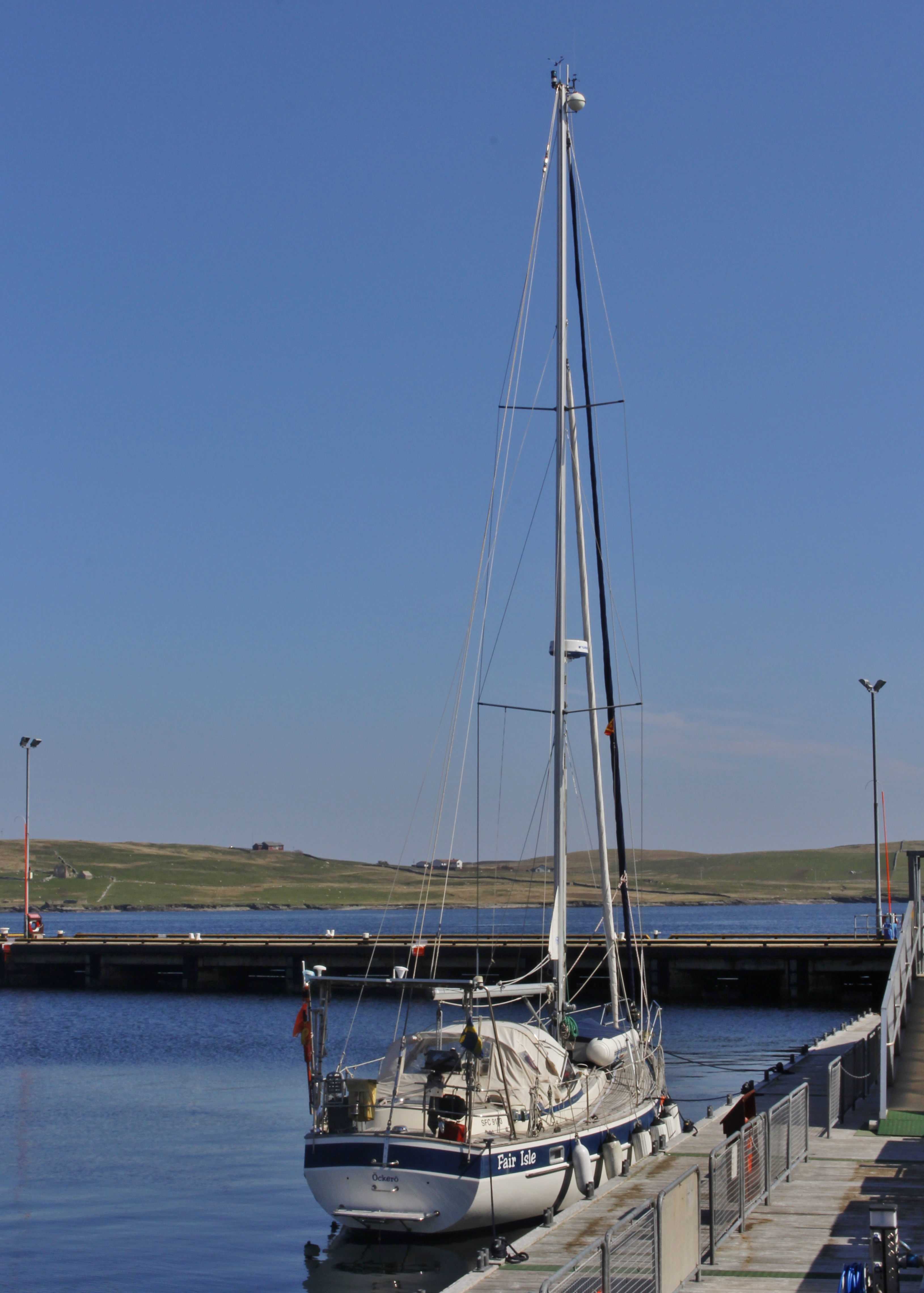 Hallberg-Rassy 382 MK I at Lerwick